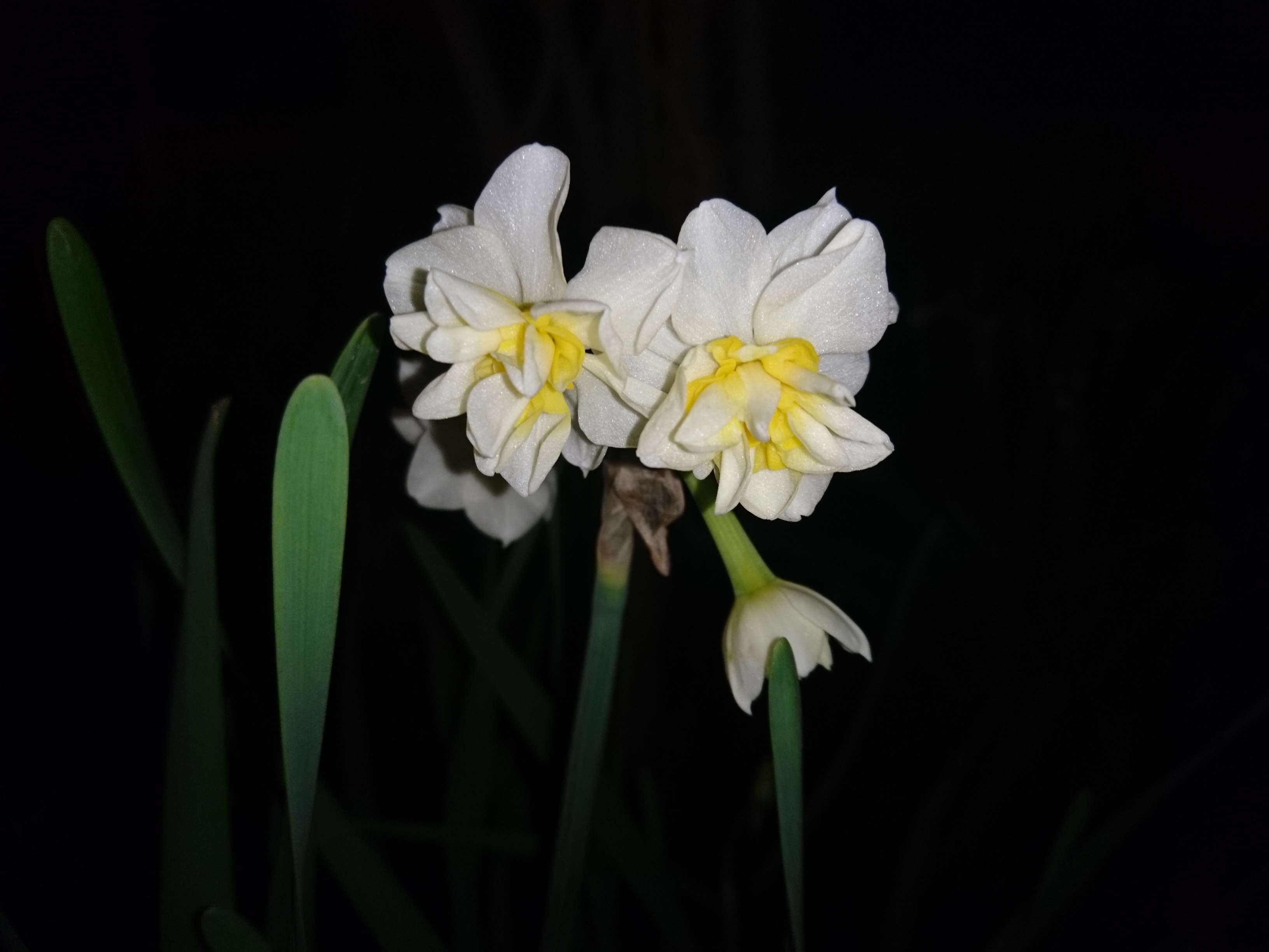 نرگس خودروی بهبهان